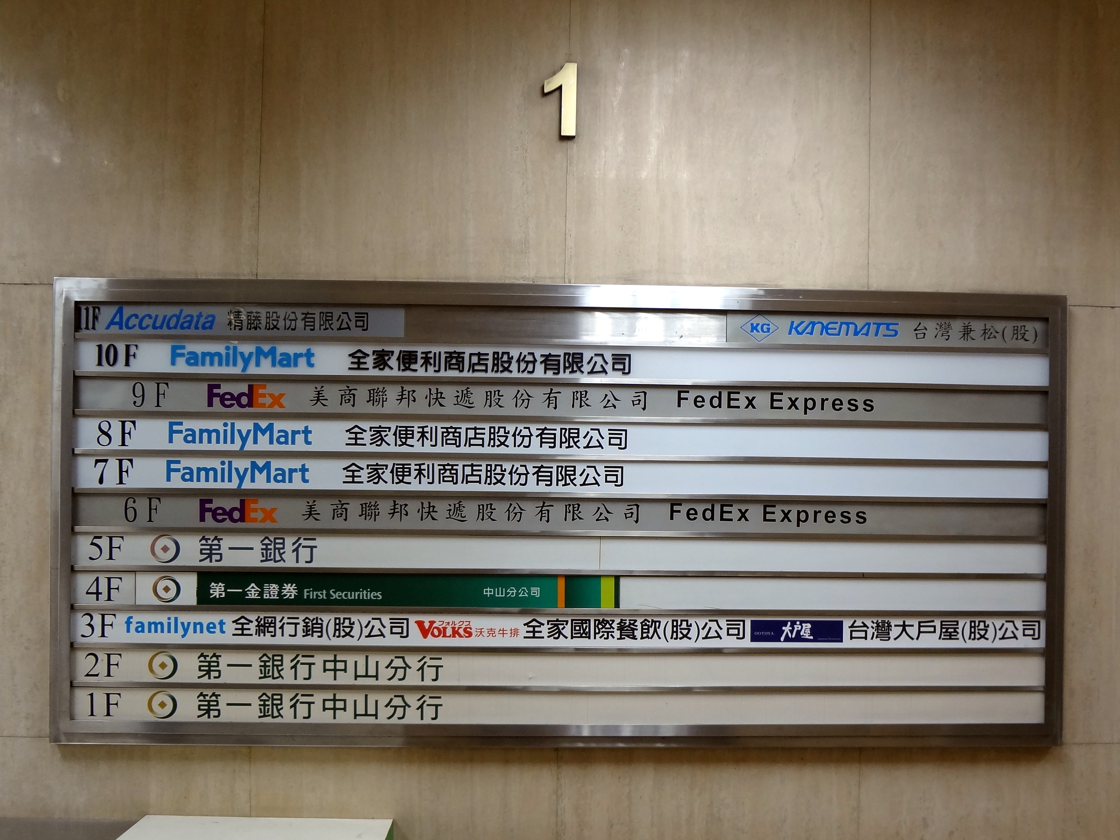 第一銀行中山大樓各樓層使用狀況圖，位於1樓大廳。全家便利商店總部在7至8樓及10樓，美商聯邦快遞股份有限公司台灣分公司總部在6樓及9樓。